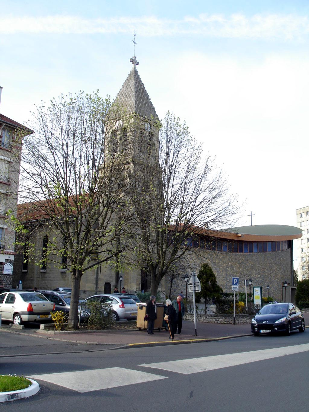 L'église Saint-Flaive à Ermont (Val-d'Oise), France